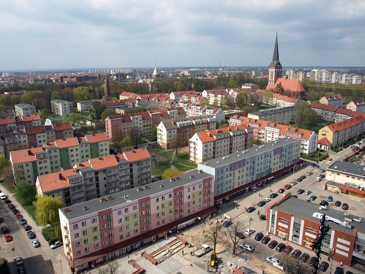 Teren Starego Miasta Stargard Szczeciński, miasto Stargard Szczeciński